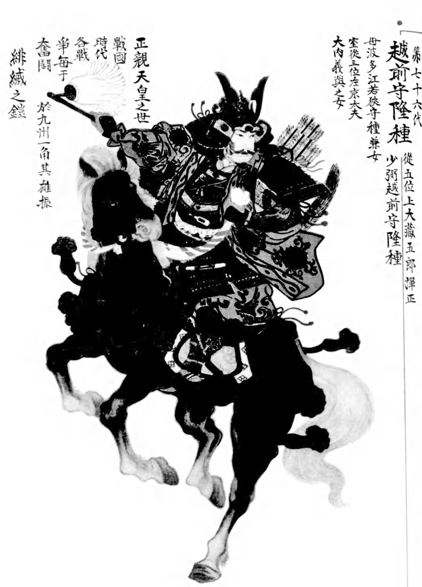 原田隆種の肖像（白黒写真）